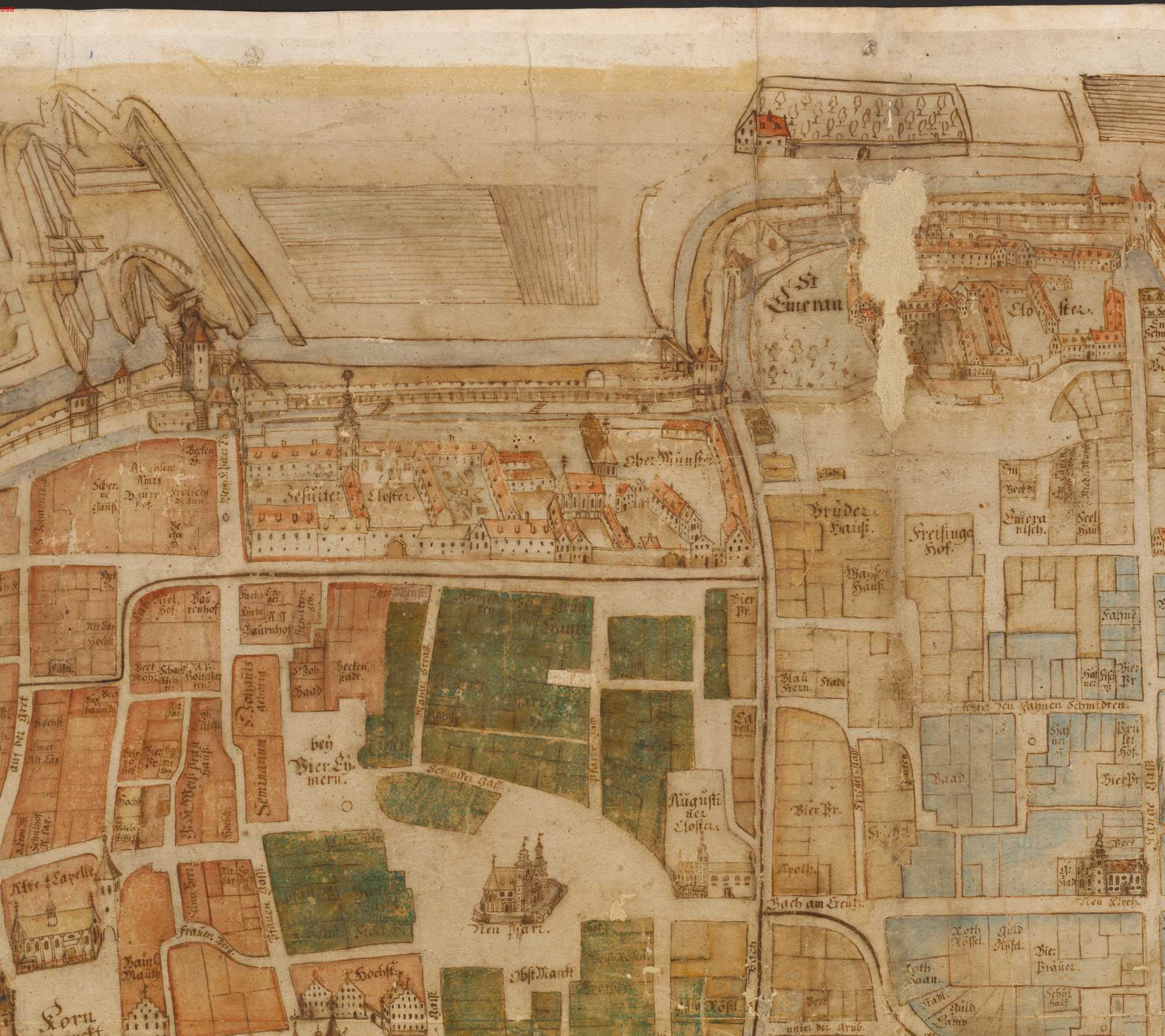 Stadtplan von Regensburg, 1700